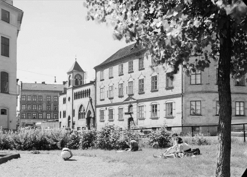 Vaterland småkirke 14. juli 1956